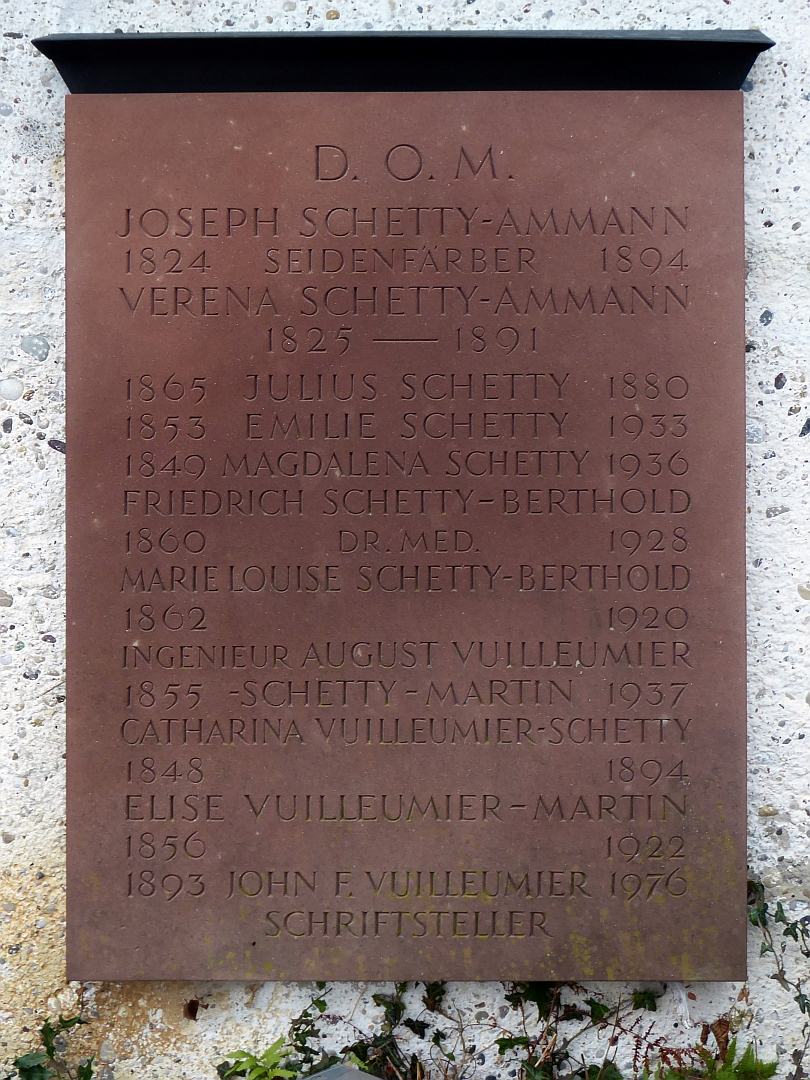 Josef Schetty-Ammann (1824-1994) sozialer Unternehmer, Seidenfärber, Schetty&Söhne, Politiker, Chef des Feuerwehrkorps. Familiengrab auf dem Friedhof Hörnli, Riehen, Basel-Stadt